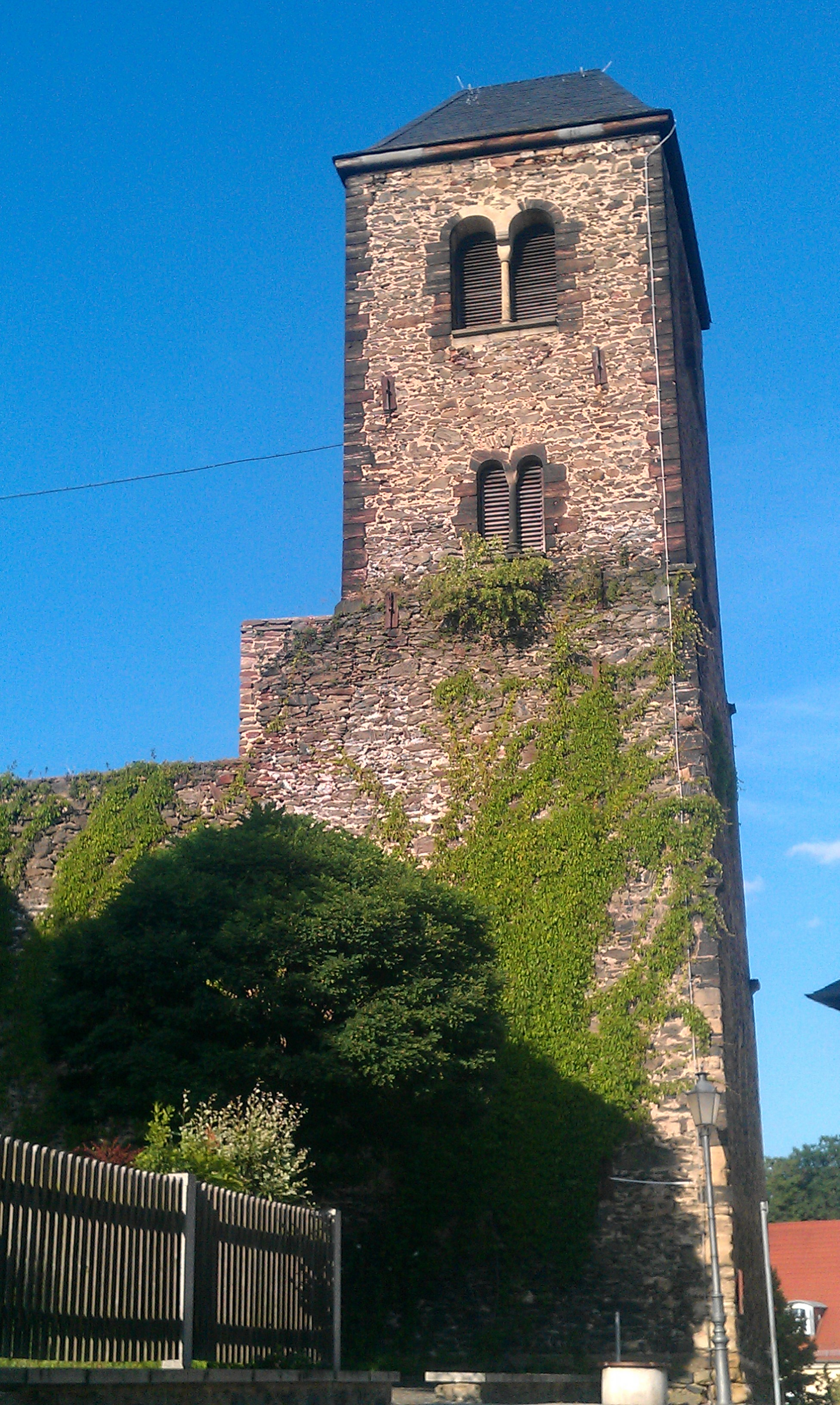 Peterskirchturm